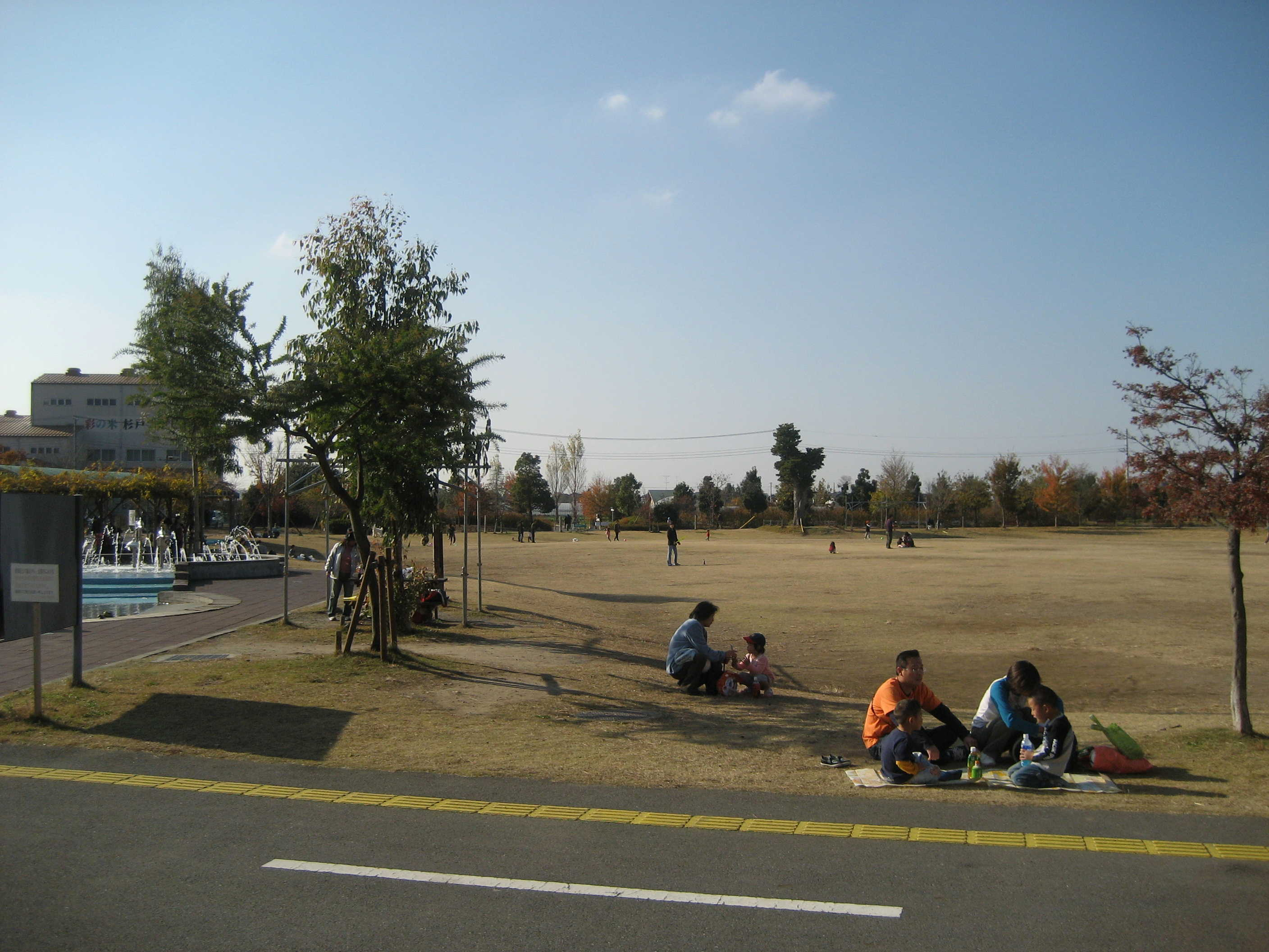 アグリパークゆめすぎと広場